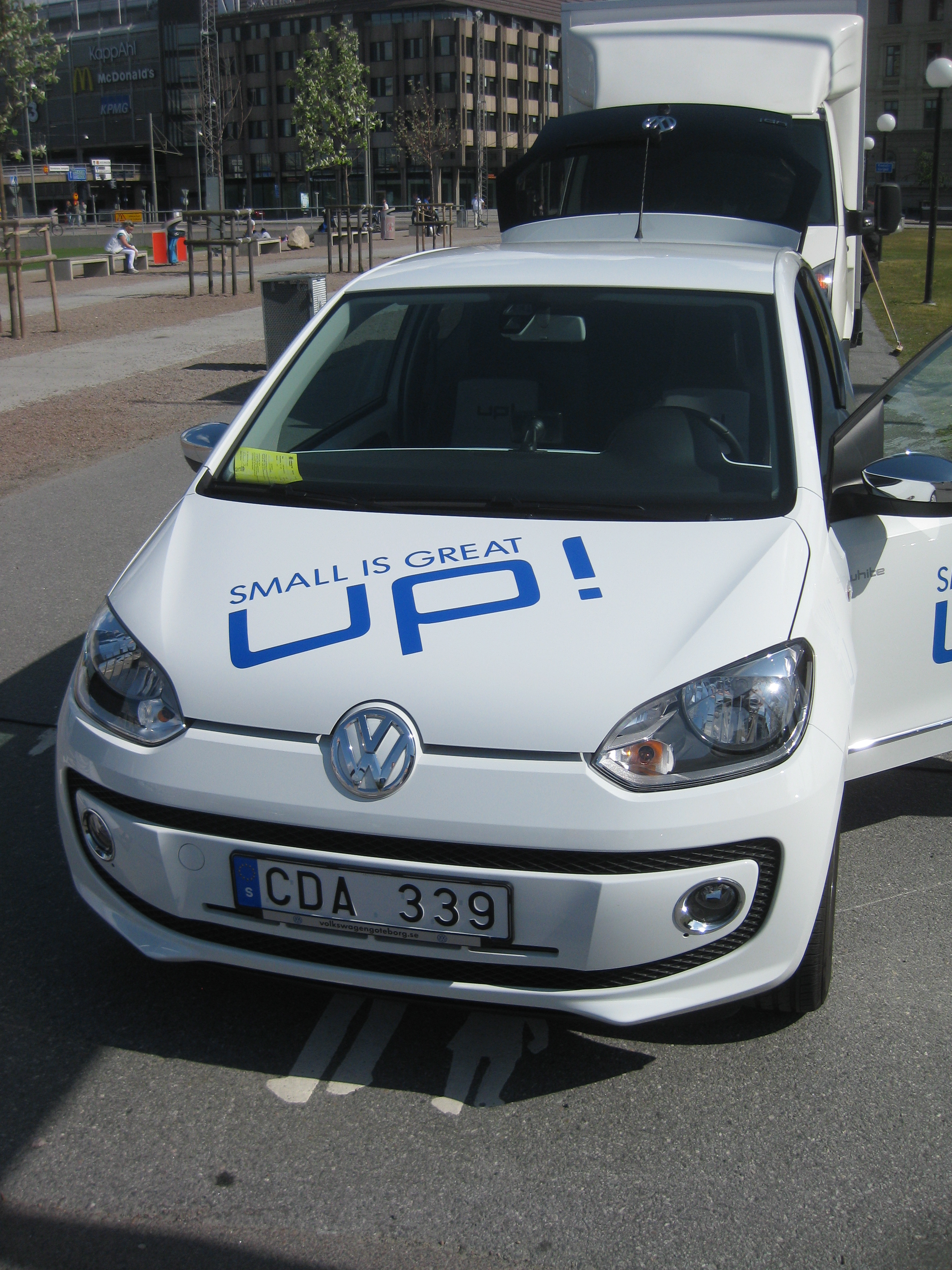 Volkswagen up!